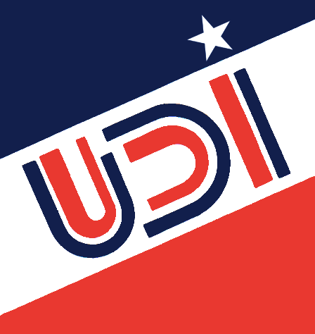 Emblema de la Unión Demócrata Independiente entre 1983 y 1989.